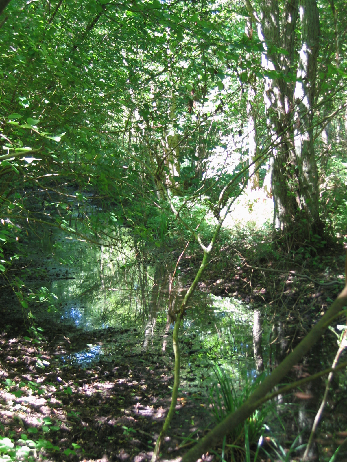 Vivier de Tancarville, Tancarville, Seine-Maritime, France